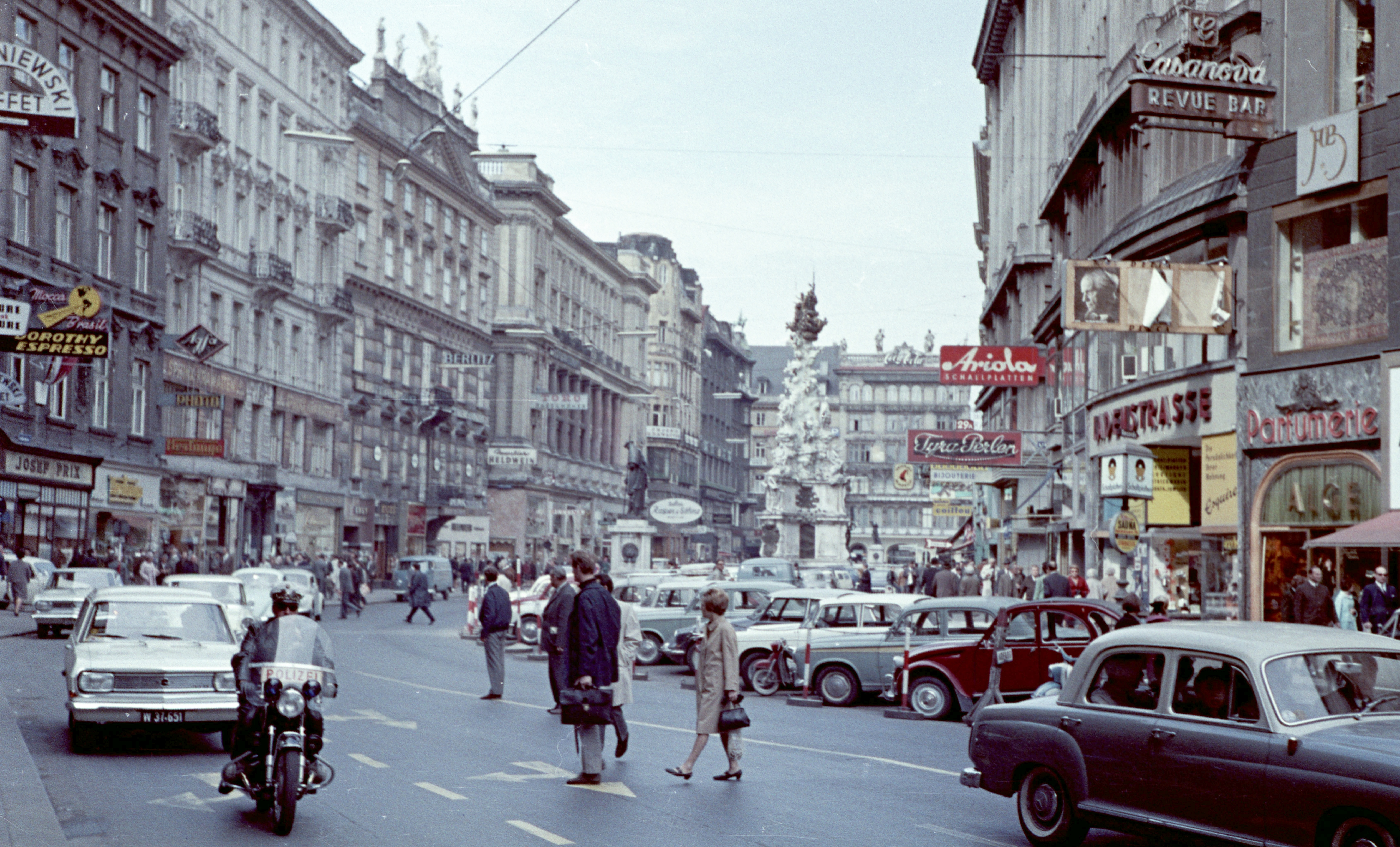 Graben, szemben a Pestisoszlop. Location: Austria, Vienna Tags: colorful Title: Graben, szemben a Pestisoszlop.